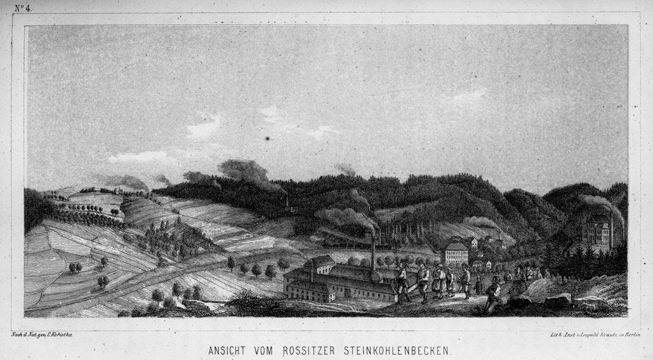 Ansicht vom Rossitzer Steinkohlebecken, aus: Carl Koristka: Die Markgrafschaft Mähren und das Herzogthum Schlesien in ihren geographischen Verhältnissen, Wien und Olmütz : Eduard Hölzel, 1861.